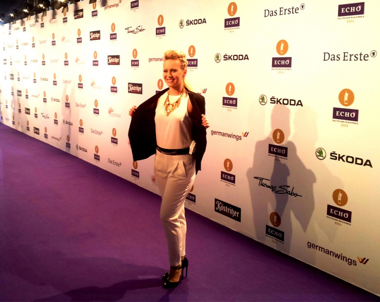 Franziska beim ECHO 2013 in Berlin